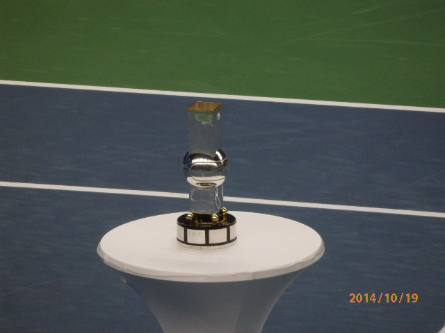 Dobbeltrofeet i Stockholm Open